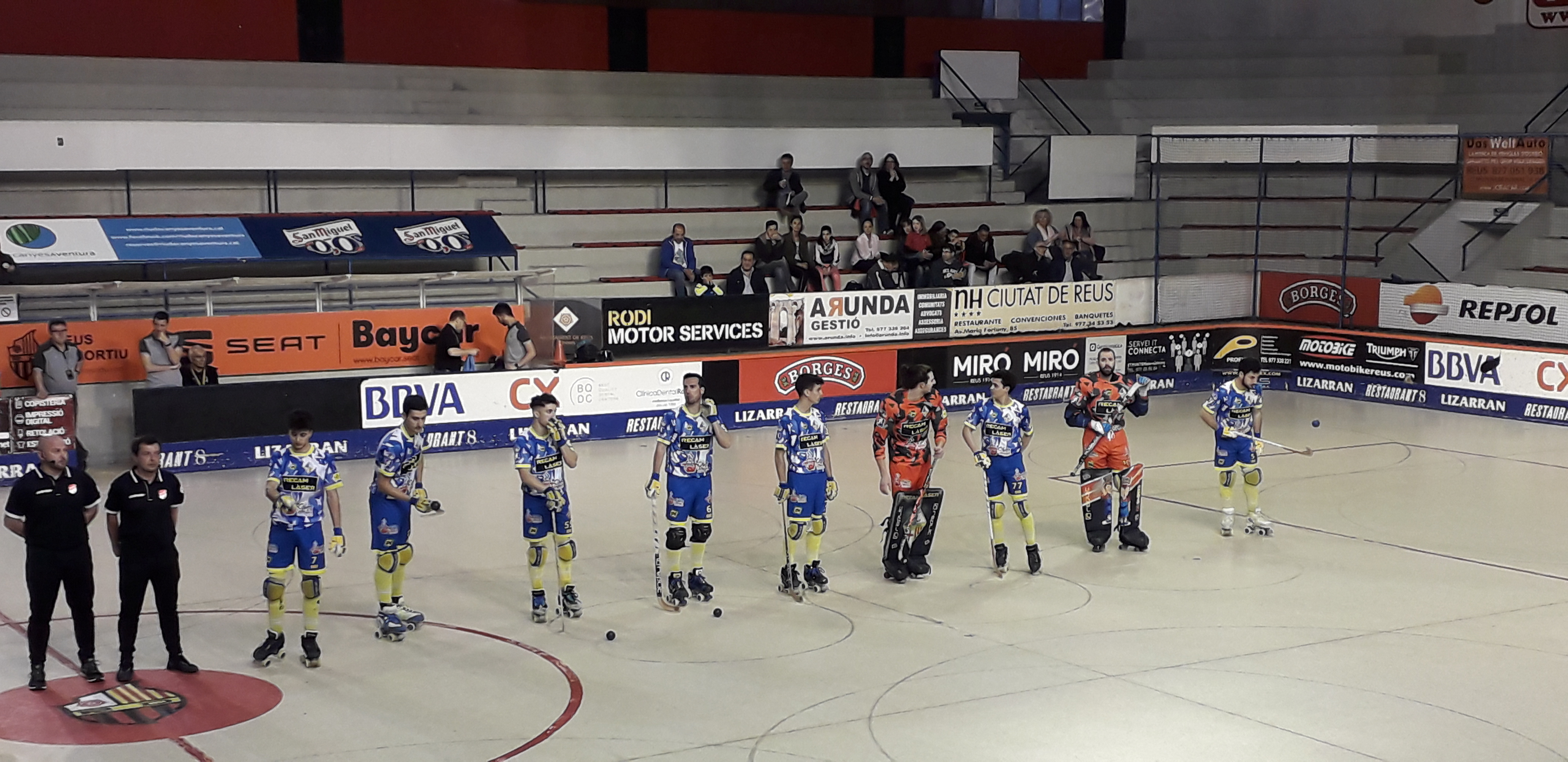 Plantilla Club Hoquei Caldes